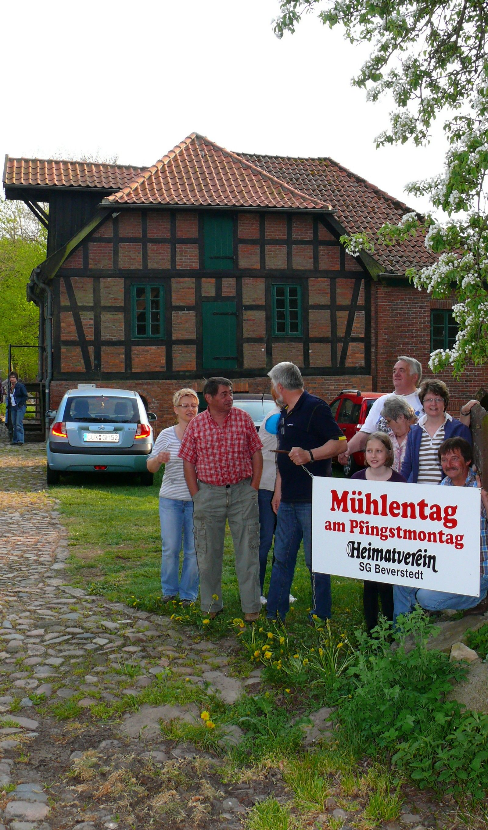 Wassermühle Deelbrügge, Ausschilderung zum Mühlentag 2013